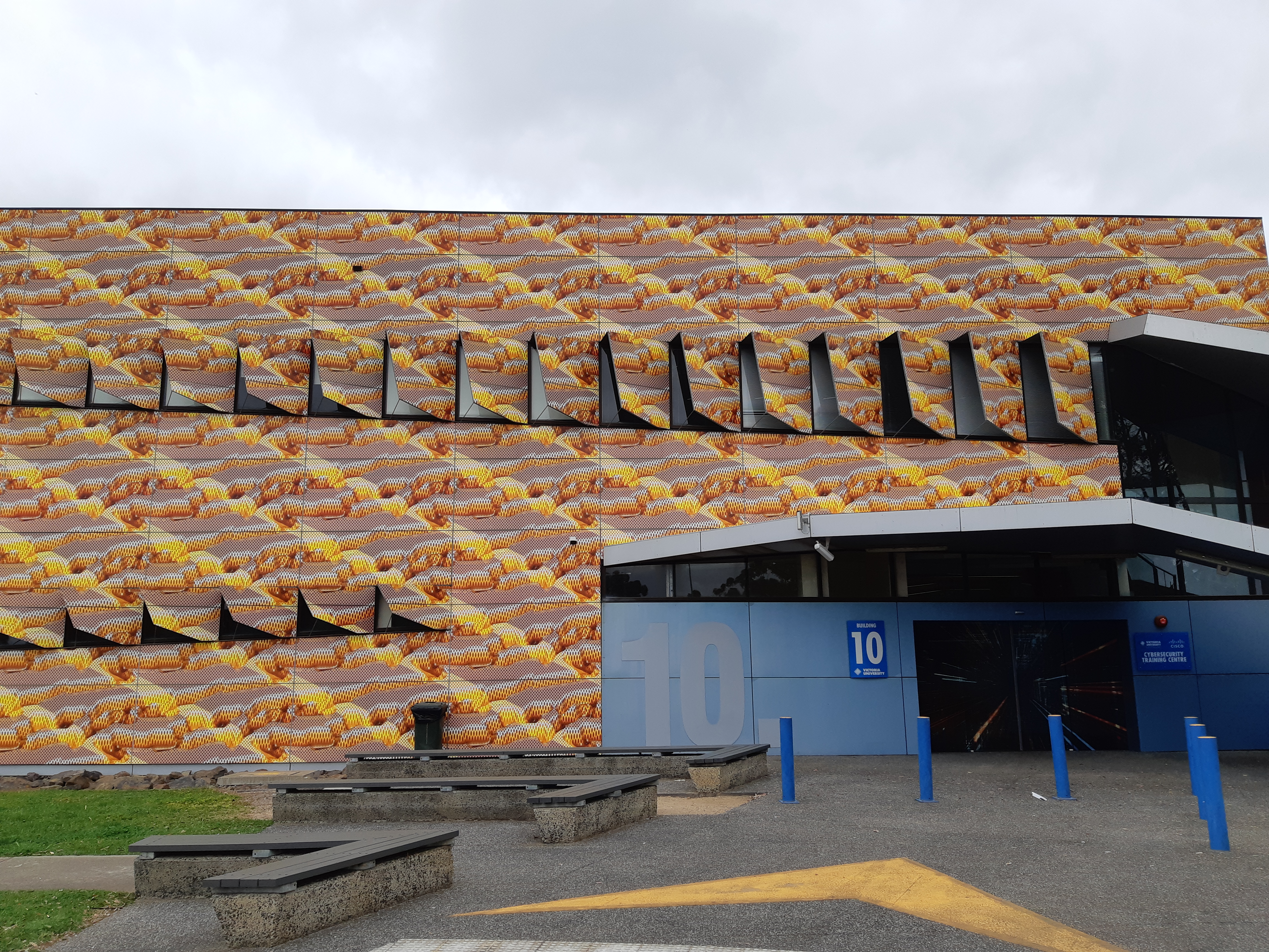 Kampus Saint Albans, Universitas Victoria